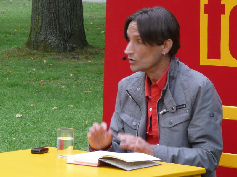 German writer Jonas Torsten Krüger reads at the Erlanger Poetenfest 2011